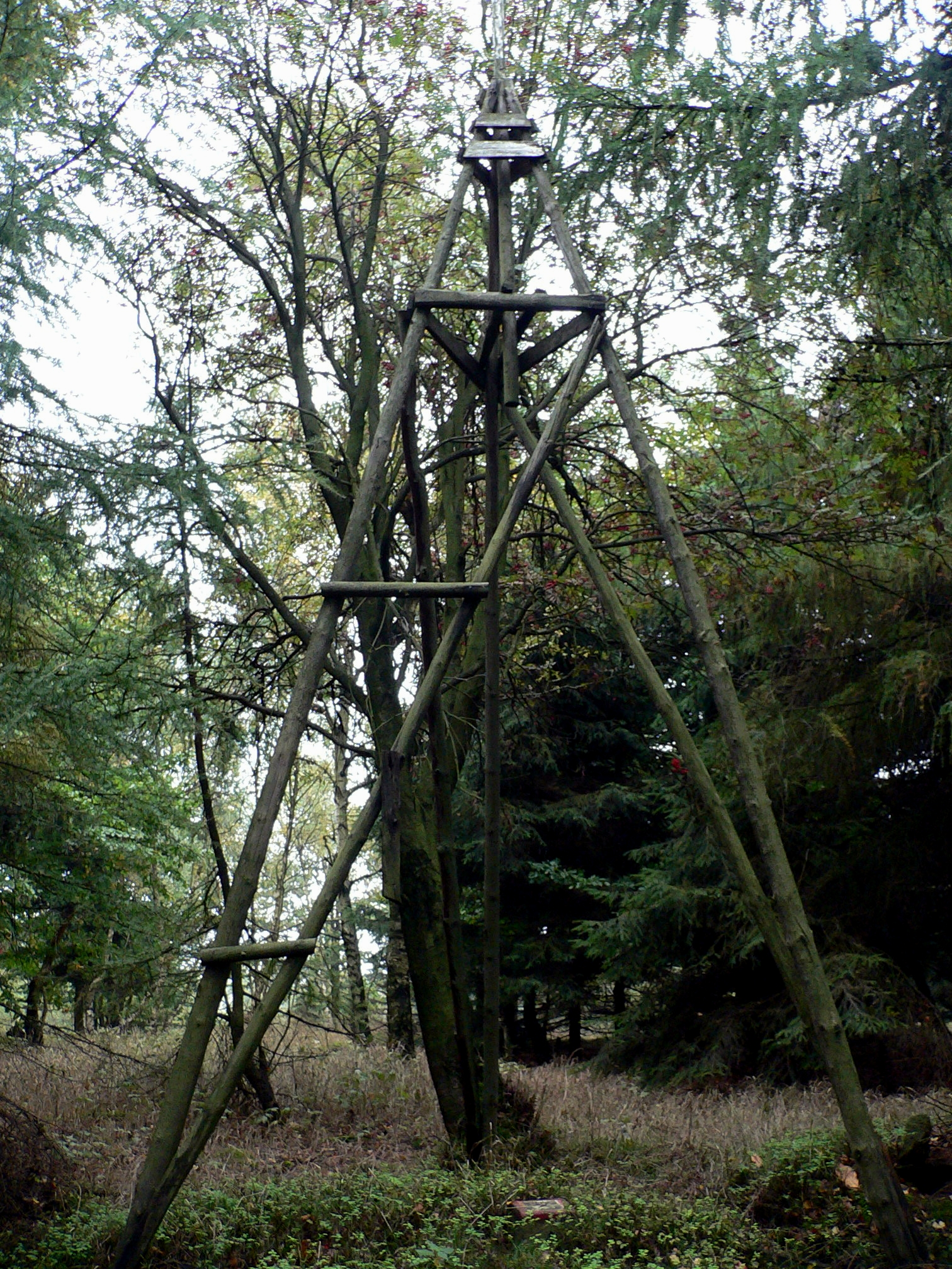 Triangulační bod na Jelením vrchu v Krušných horách. Ve spodní části je umístěn kamenný geodetický označník, nad nímž stojí jednoduchá dřevěná konstrukce jehlanovitého tvaru.